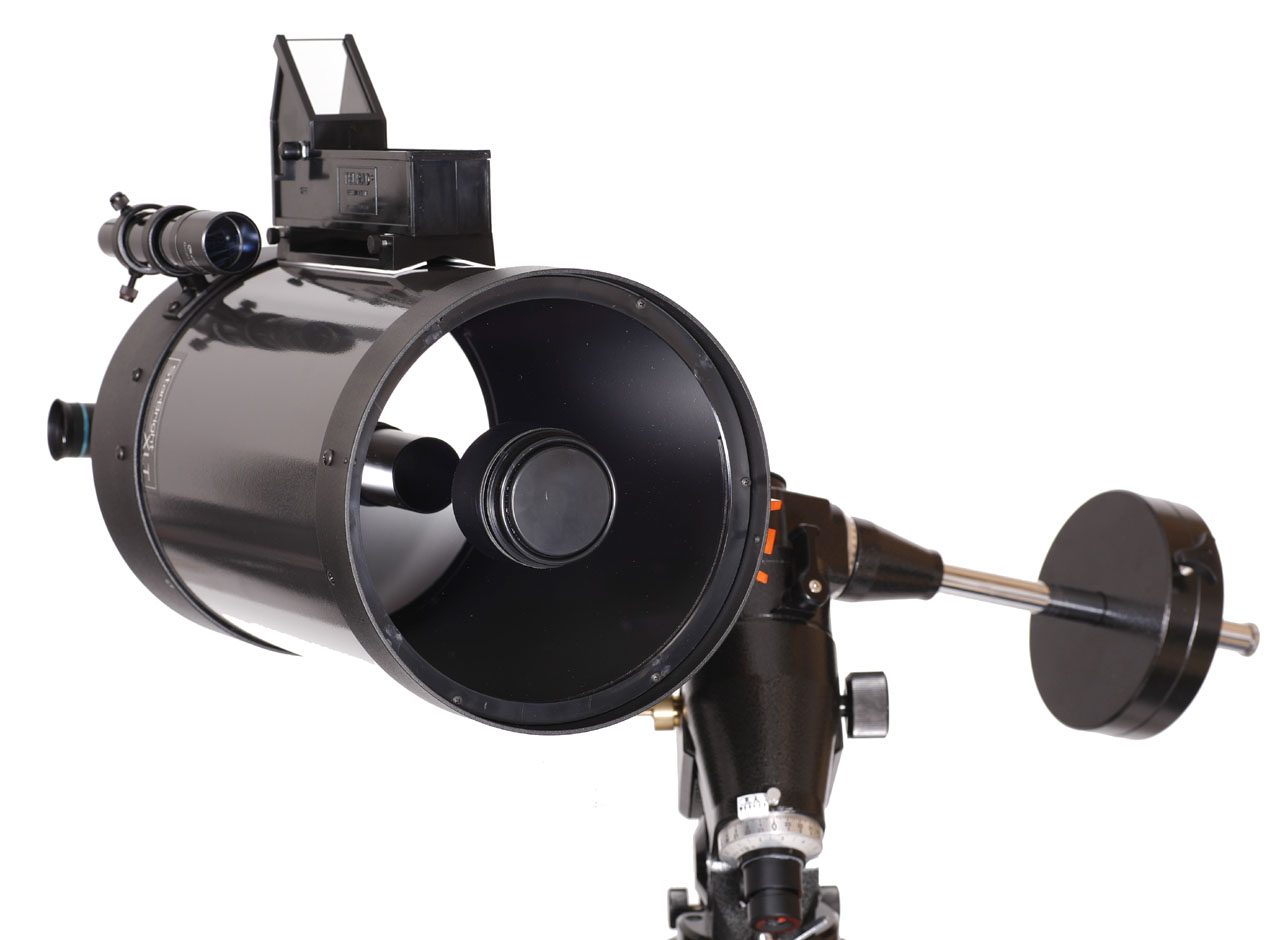 Sucherfernrohr und Telrad-Sucher gemeinsam auf einem Achtzöller. Kapege.de 15:56, 18 December 2006 (UTC)